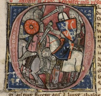 Bataille entre croisés et Turcs (1097)